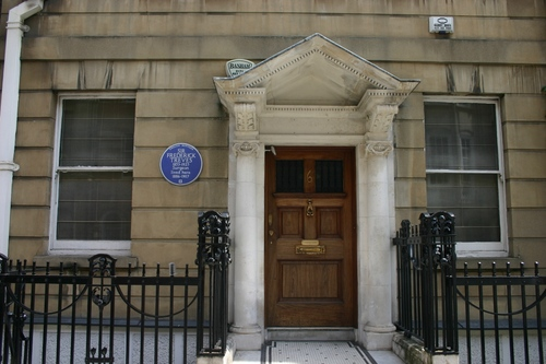 Casa londinese del chirurgo Frederick Treves